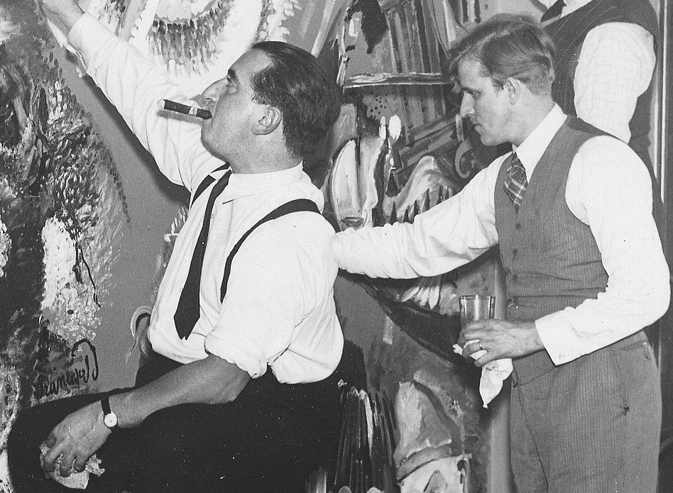 Restaurang KB dekoreras: Isaac Grünewald (t.v.) och "Jerke" (Erik Jerken)